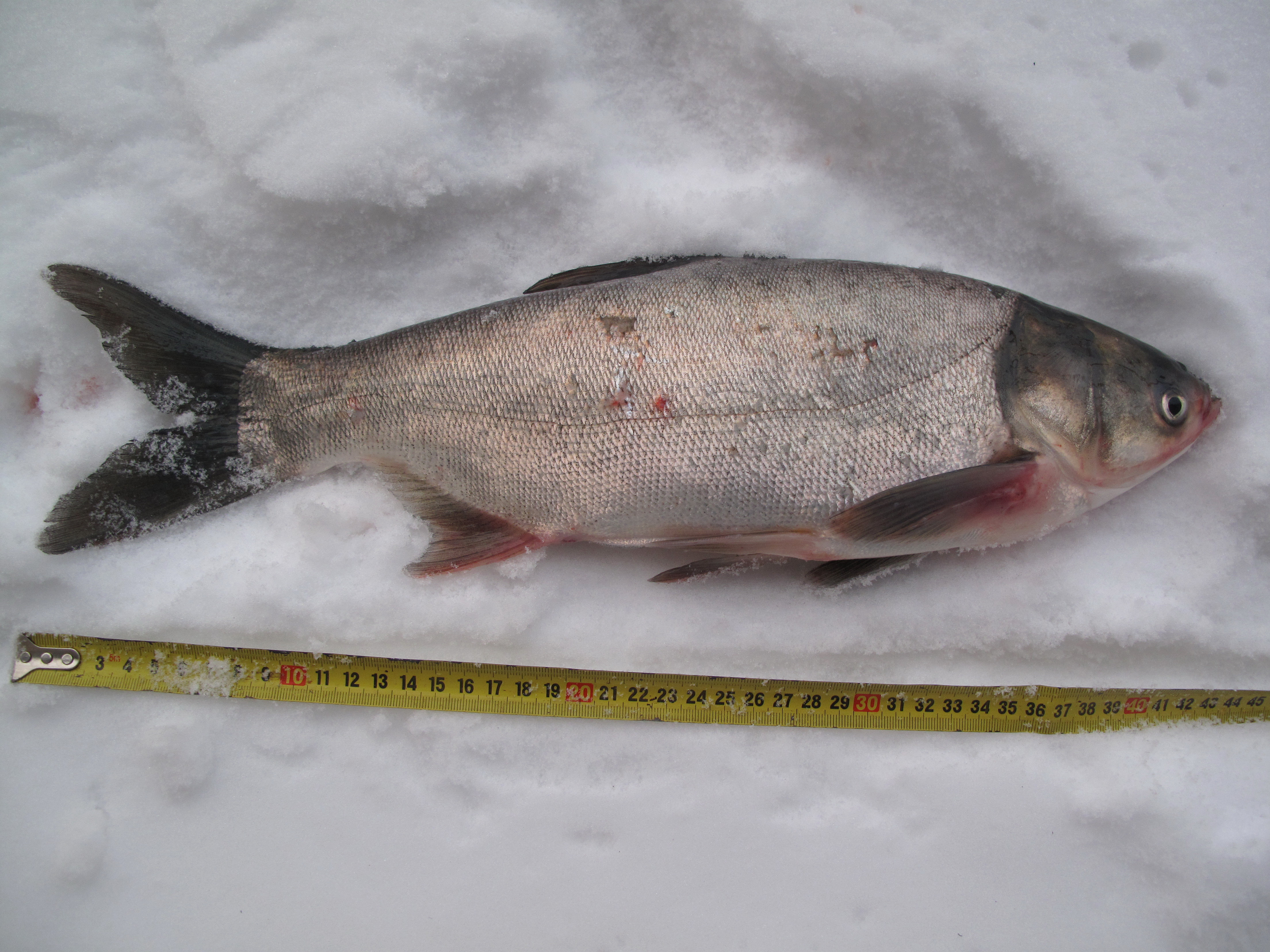 Tolstolobik bílý, délka 44,5 cm, váha 1,08 kg